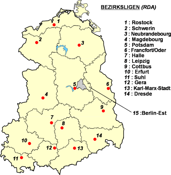 Localisation des Bezirksligen (niveau 3) du football à l'époque de la RDA Catégorie:Logo de clubs de football - Allemagne